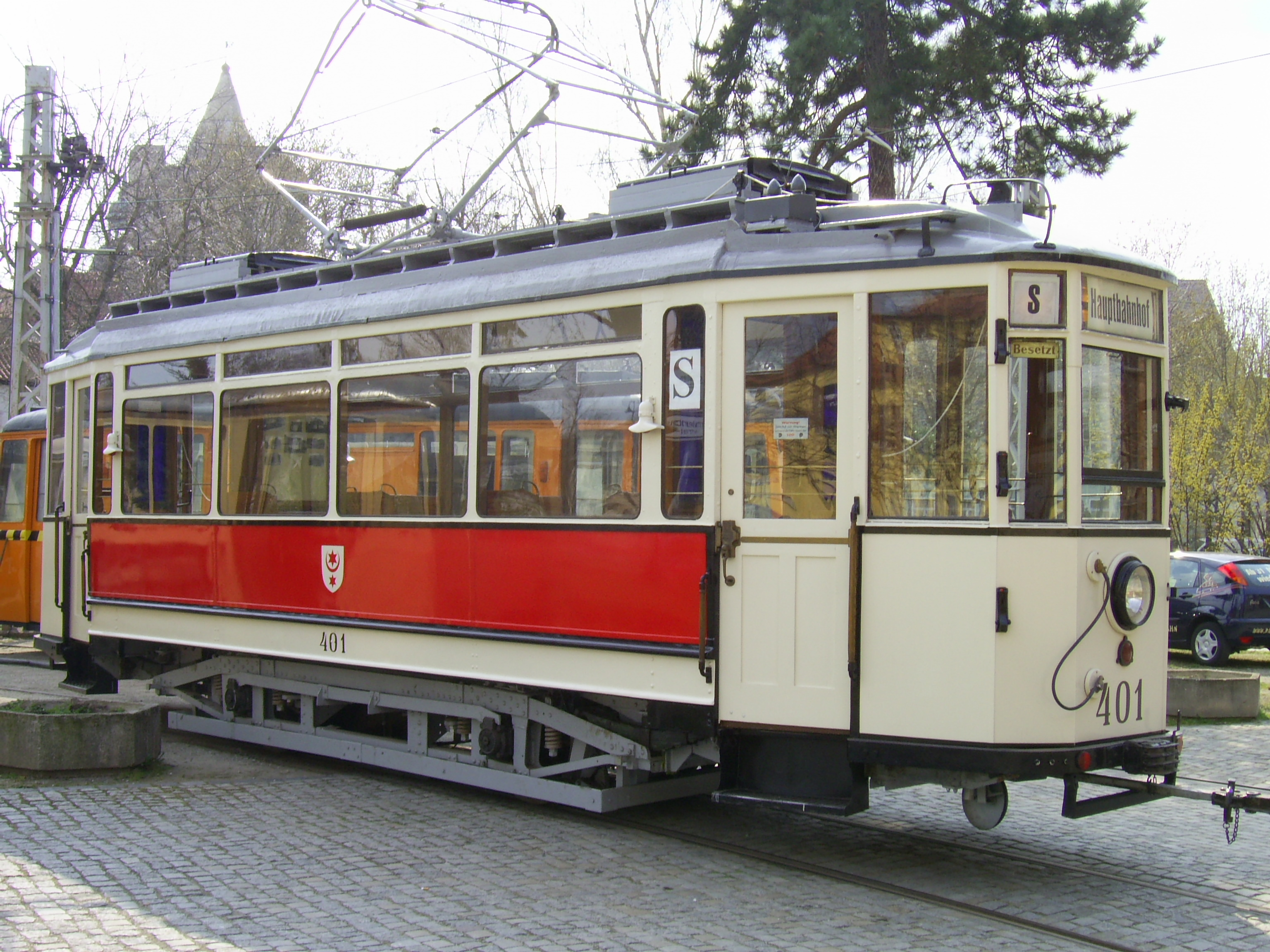 Tw401 der Straßenbahn Halle während seines Aufenthalts zum Jubiläum bei der Naumburger Straßenbahn